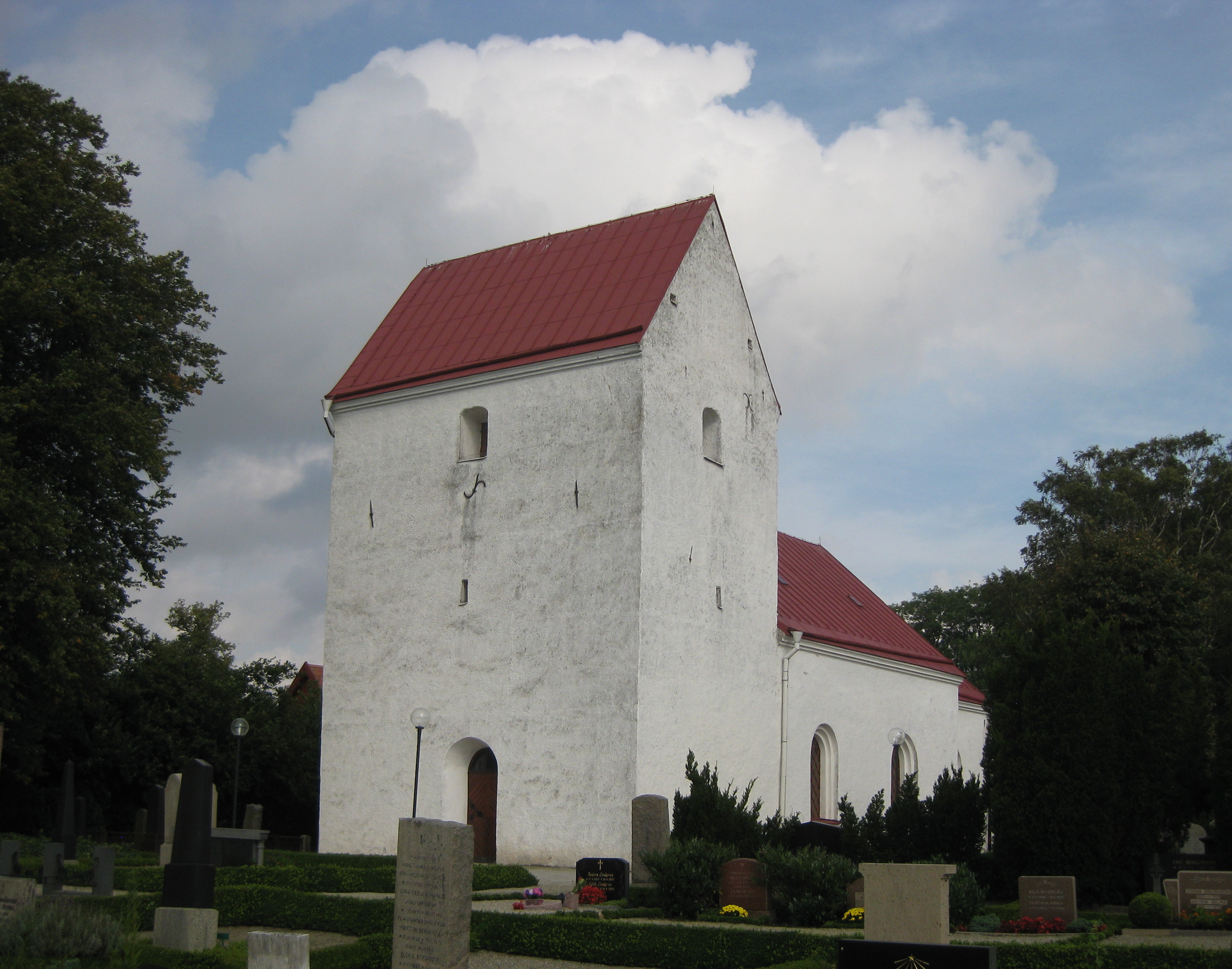 Knästorps kyrka i Skåne